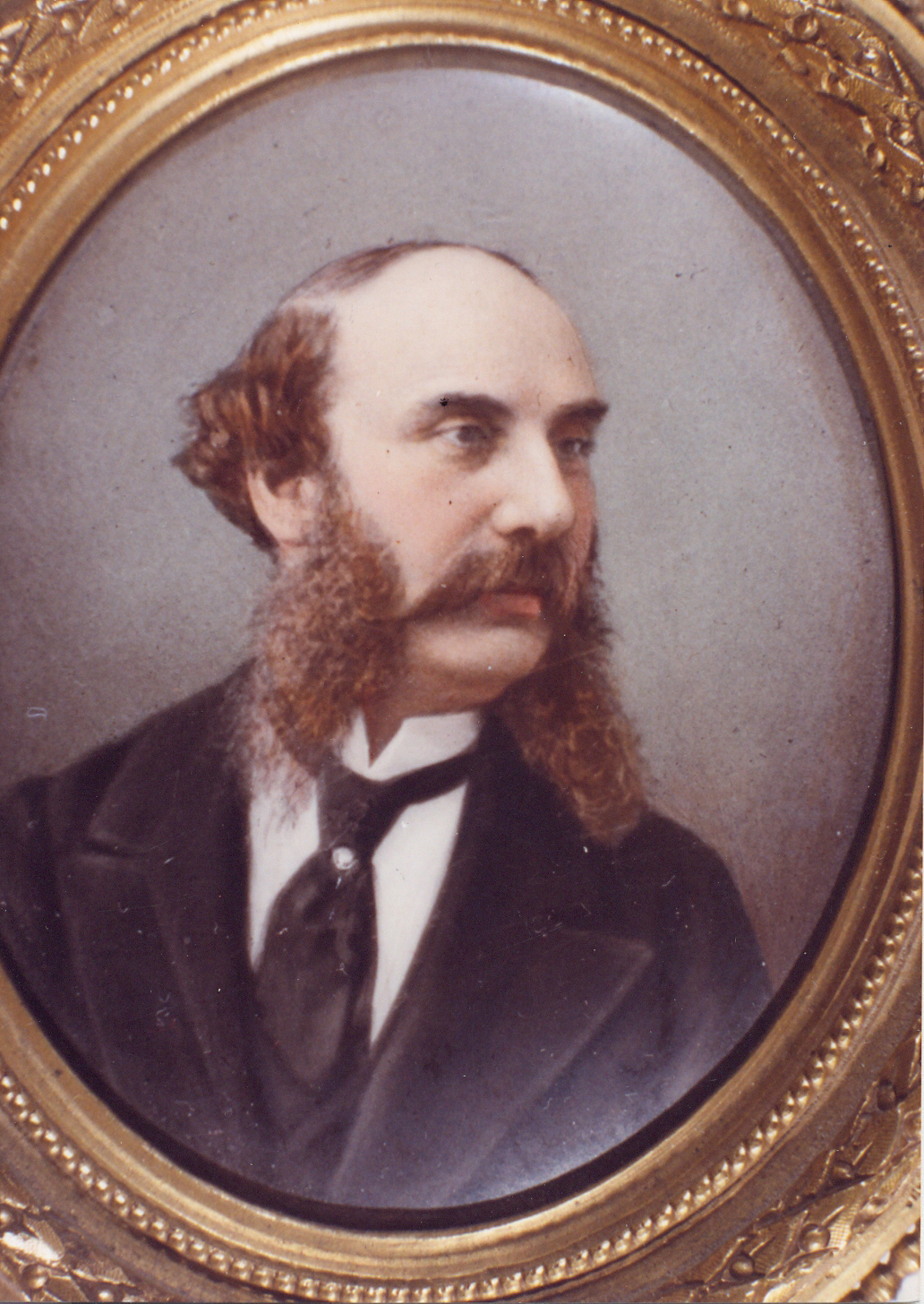 Pablo Gil y Serra: banquero francés y filántropo catalán (1816-1896)